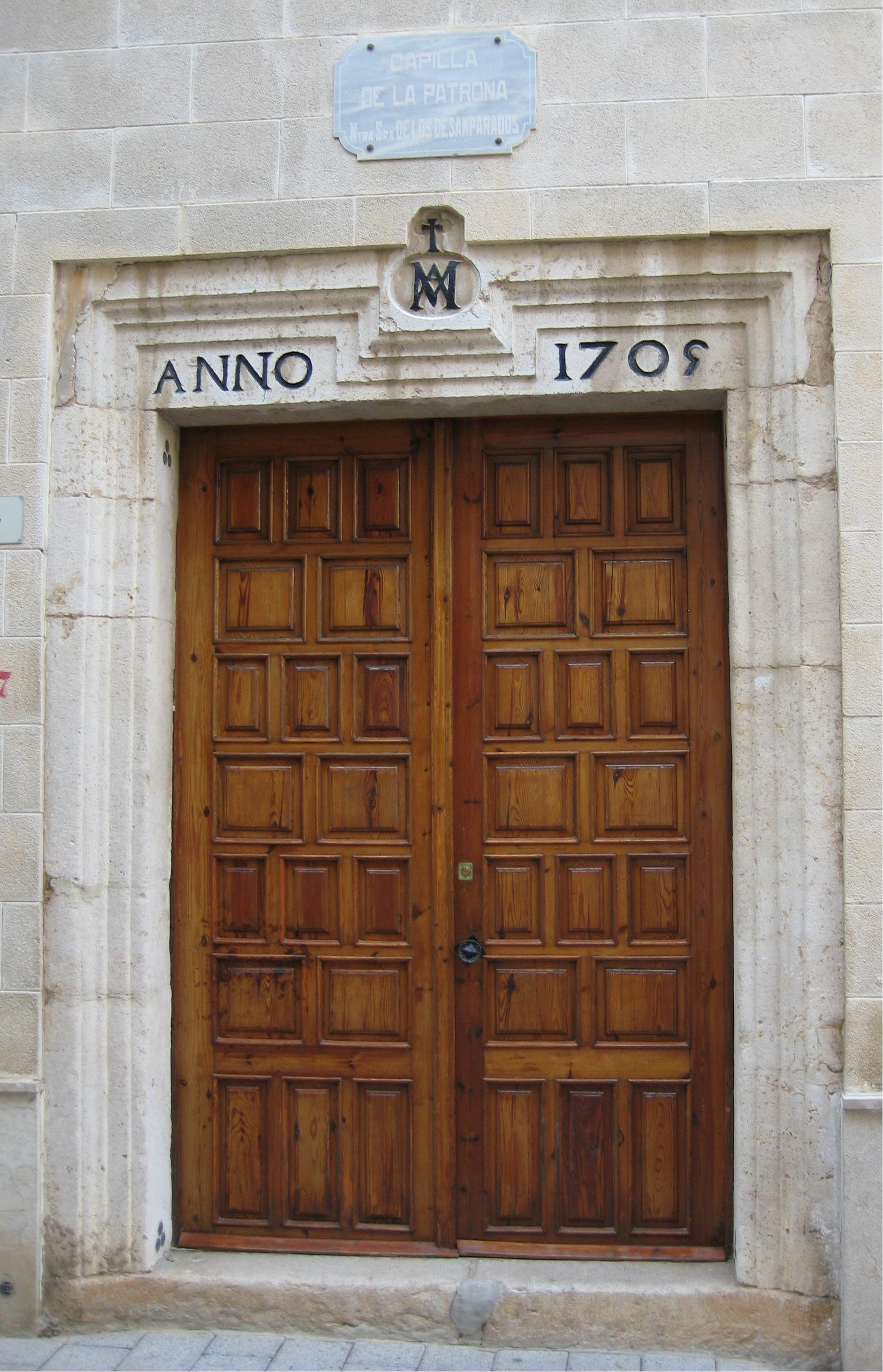 Portada de la Capella de la Mare de Déu dels Desemparats d'Alcalà de Xivert